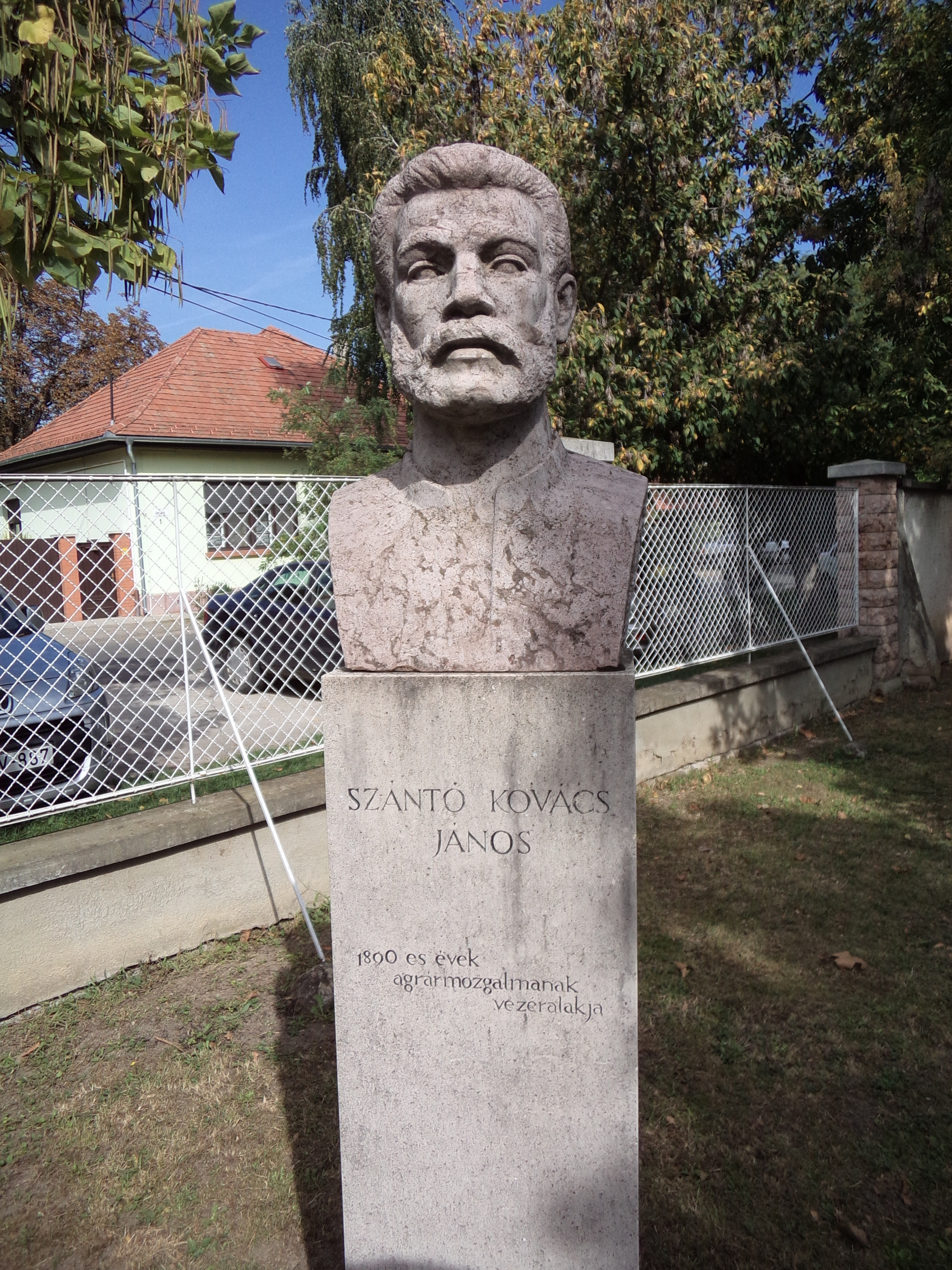 Szántó Kovács János-mellszobor (Cs. Kovács László, 1962) Orosháza, Dózsa György út 5. (Nagy Gyula Területi Múzeum korábban Szántó Kovács János múzeum)